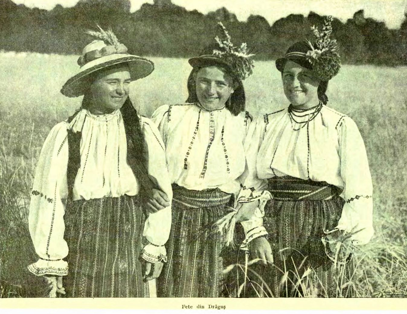 Fete din Drăguș, Brașov